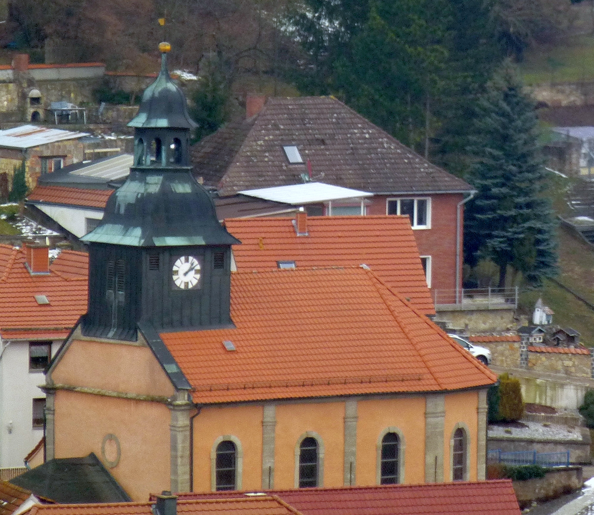 Blick zur Kirche in Faulungen